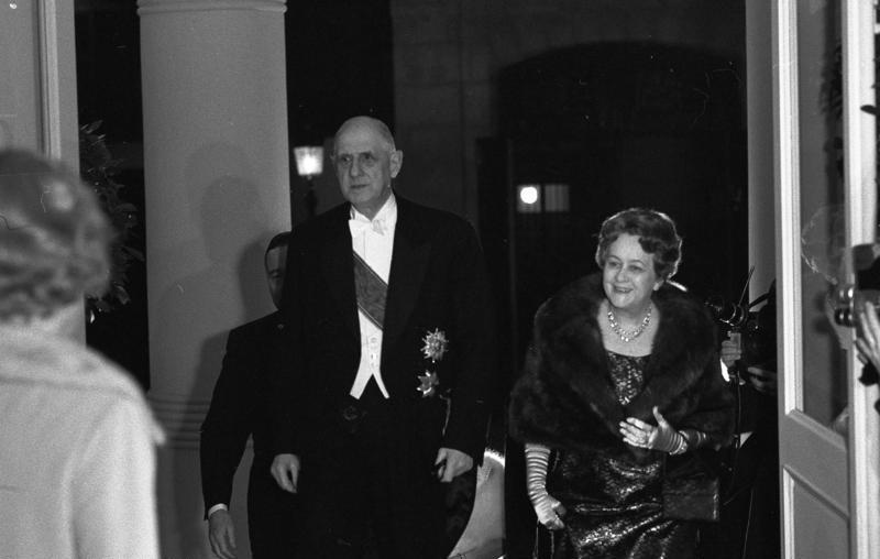 Einweihung der deutschen Botschaftsresidenz, Palais Beauharnais, in Paris. 23-34 Empfang für Staatspräsident de Gaulle.